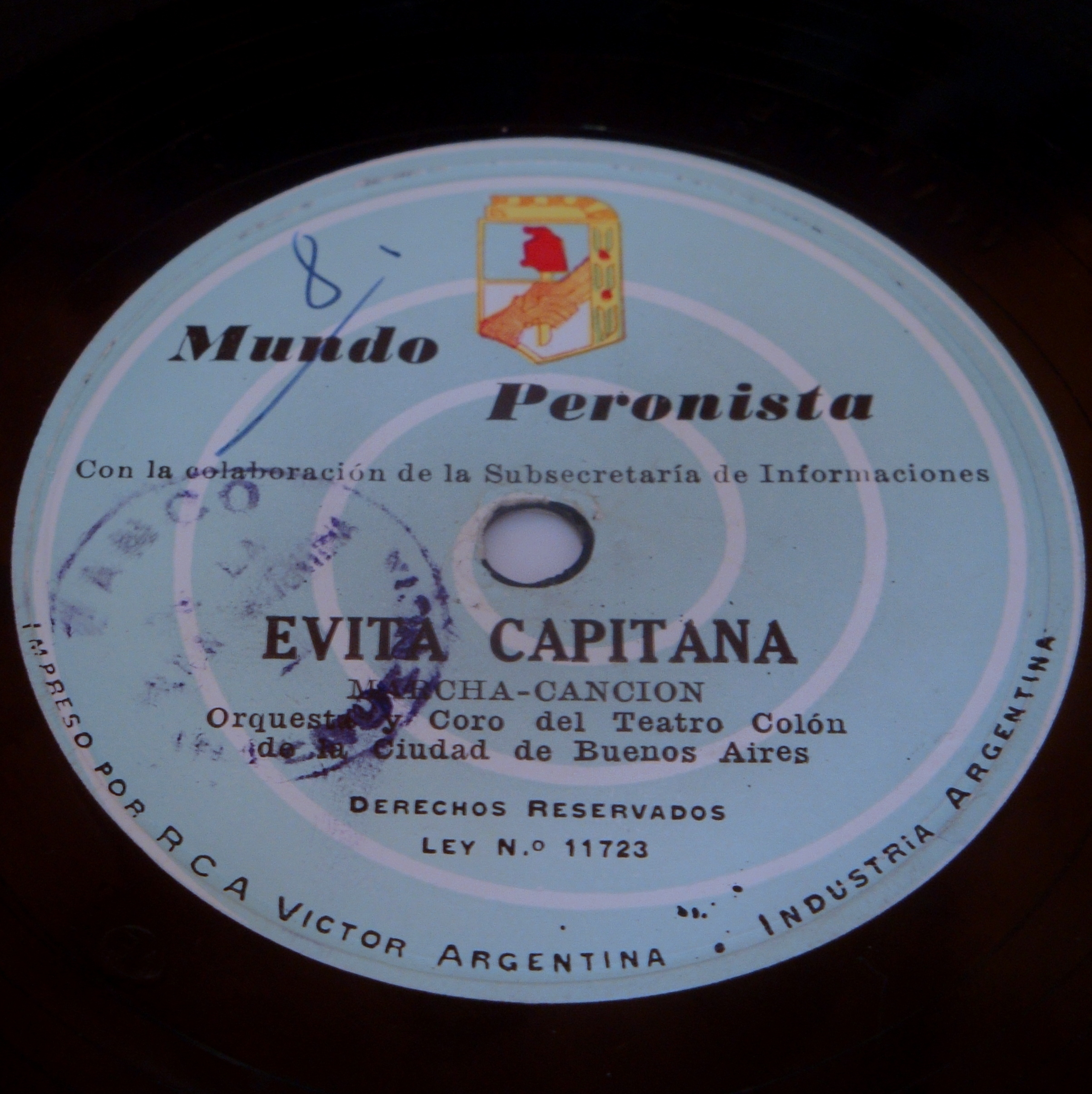 Disco de pasta editado en 1955 con los temas "Los Muchachos Peronistas" y "Evita Capitana".